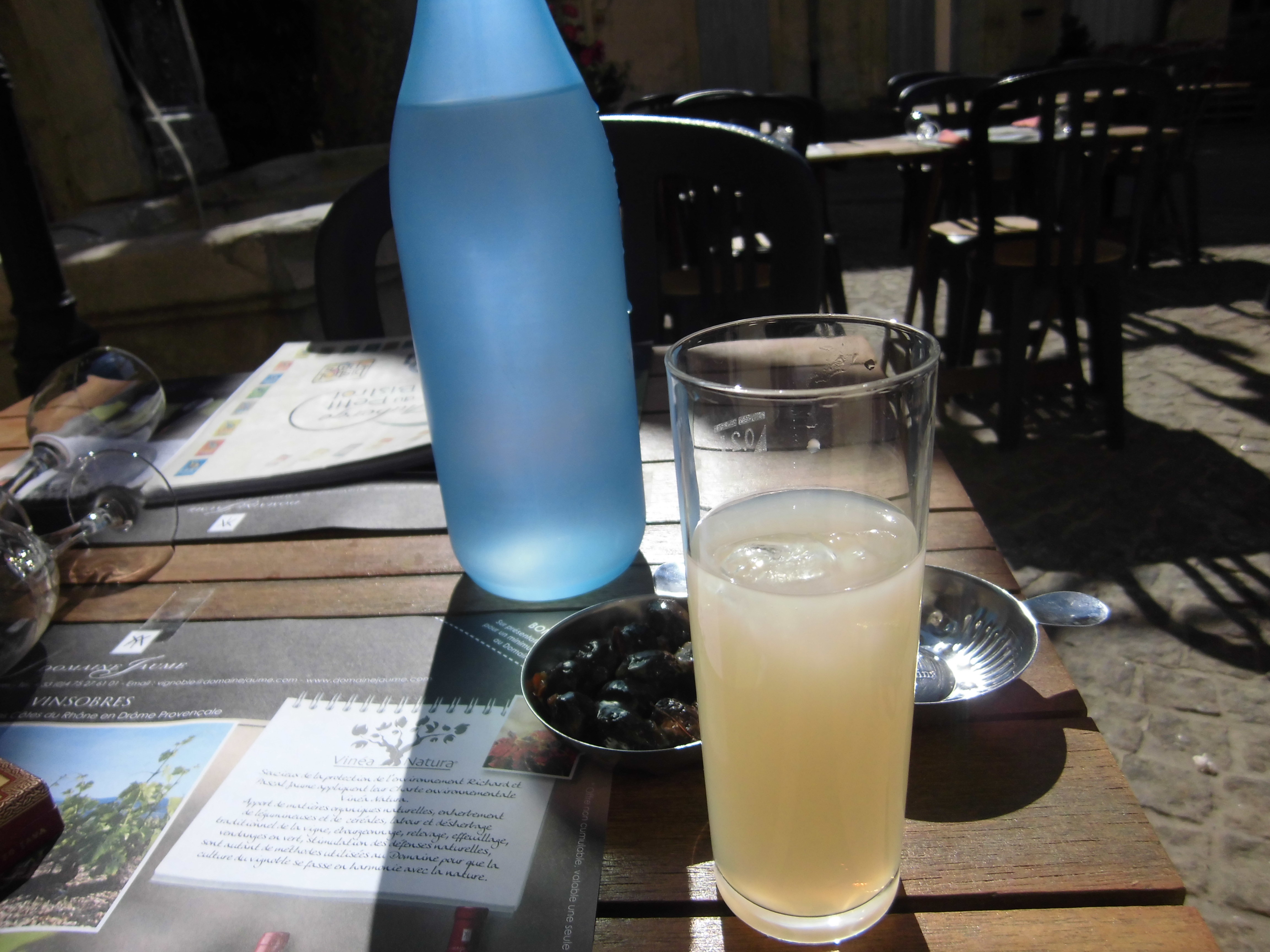 Pastis et olives noires de Nyons